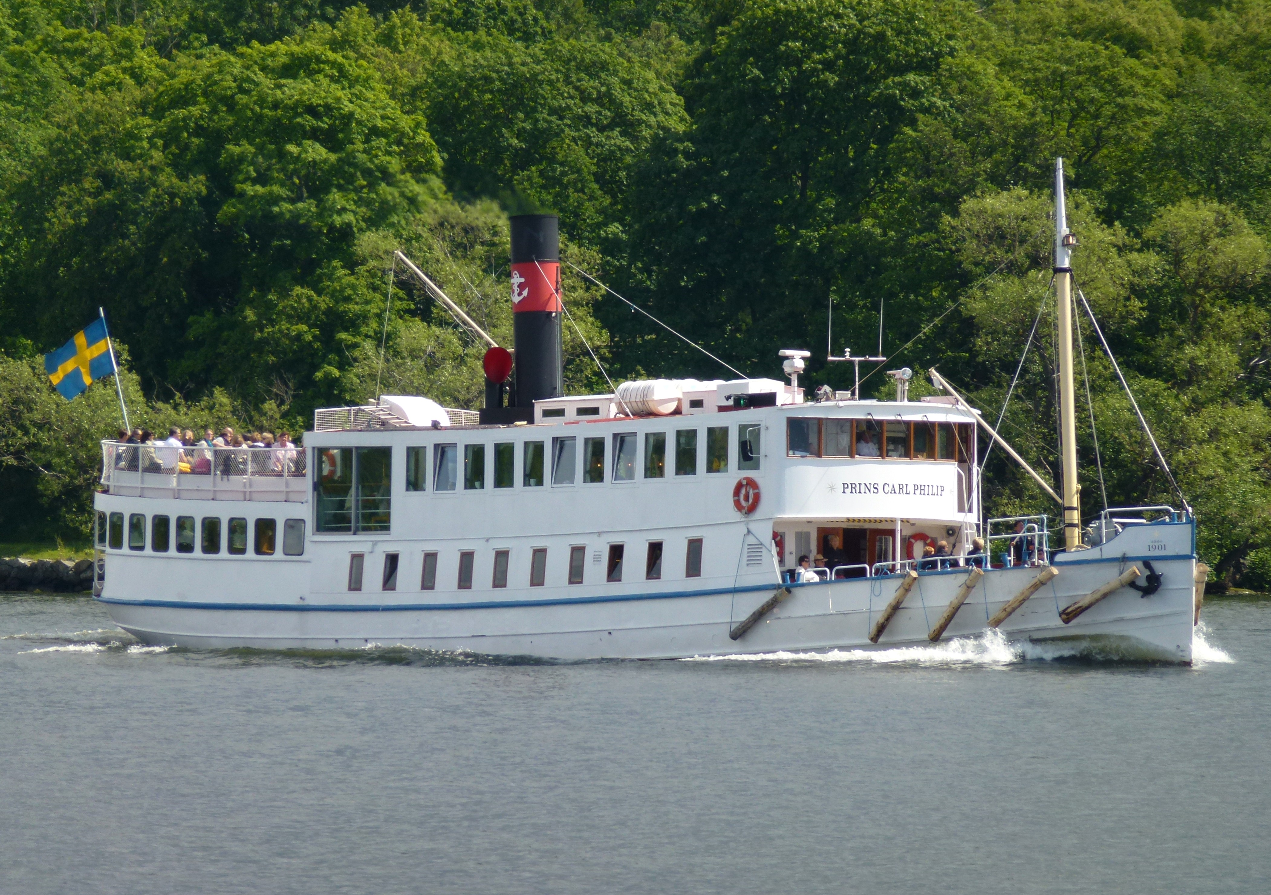 M/S Prins Carl Philip utanför Långholmen